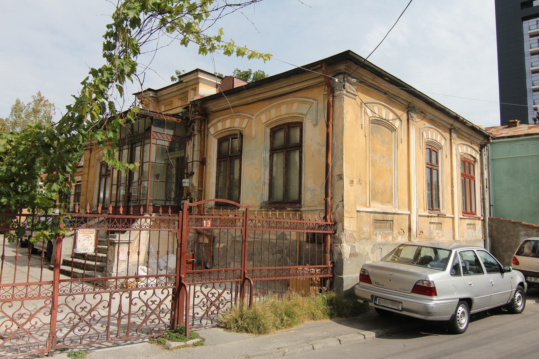 Casă pe Str Robescu